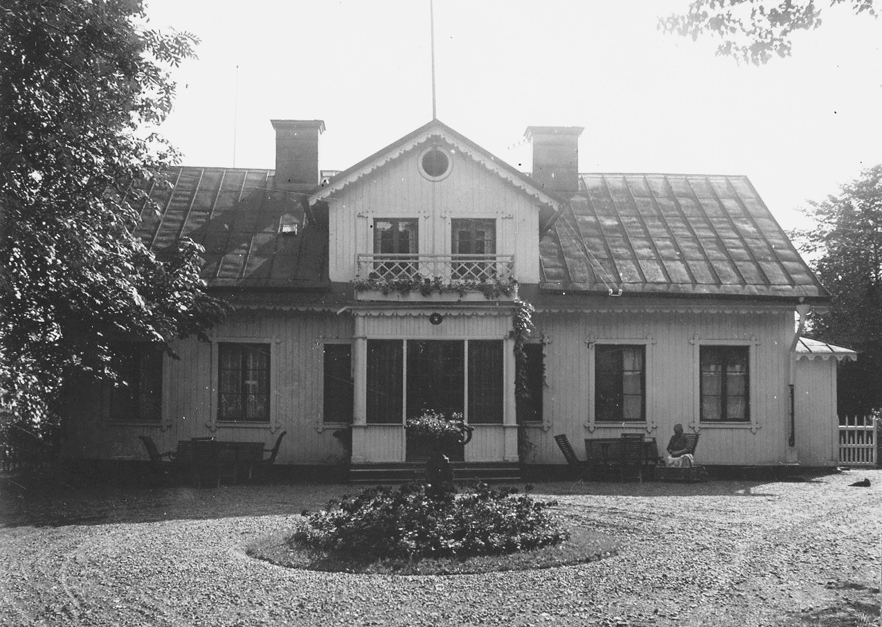 Gubbängens gård, huvudbyggnad